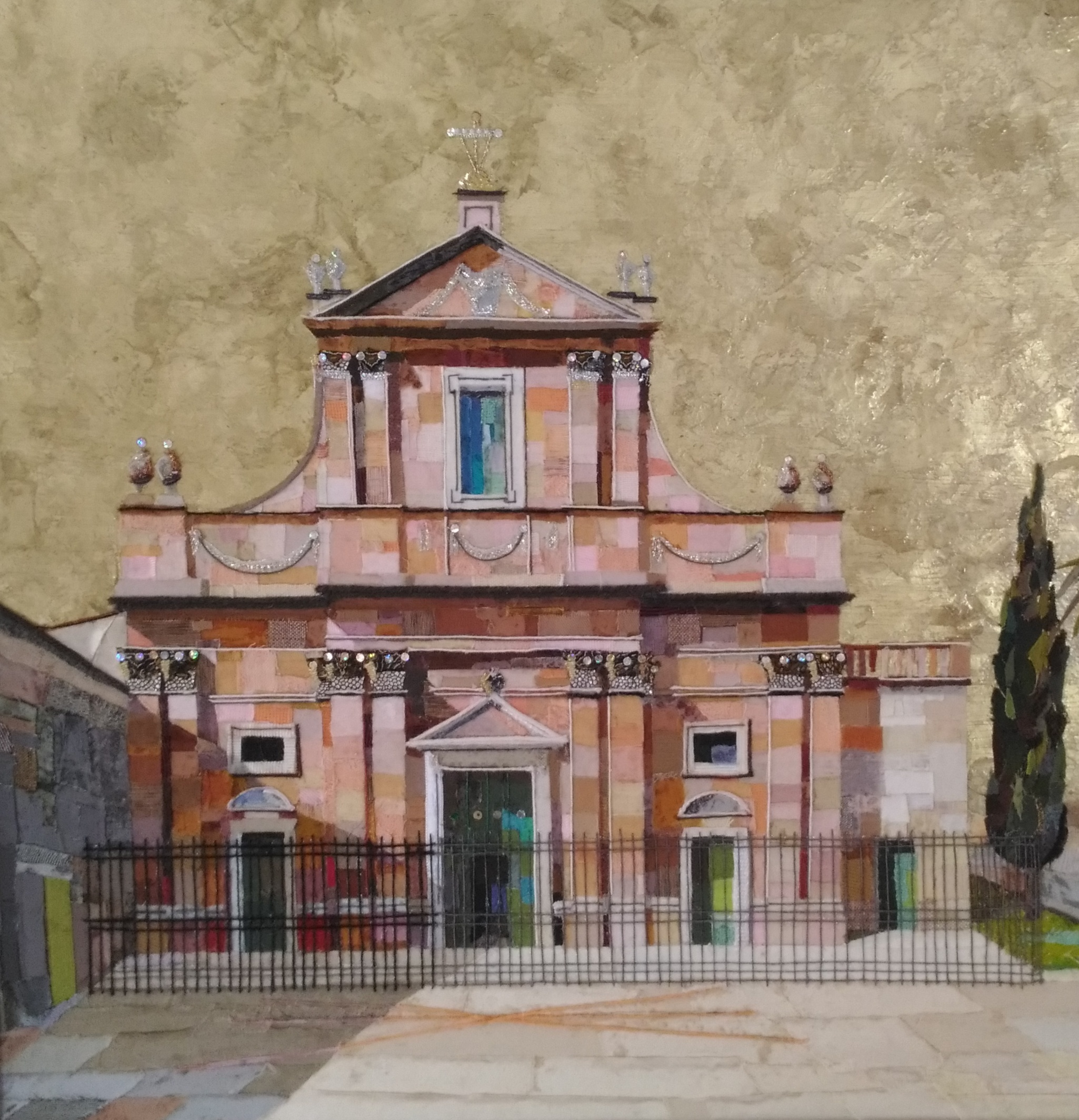 Opera in tarsie di seta di Gisella Giovenco